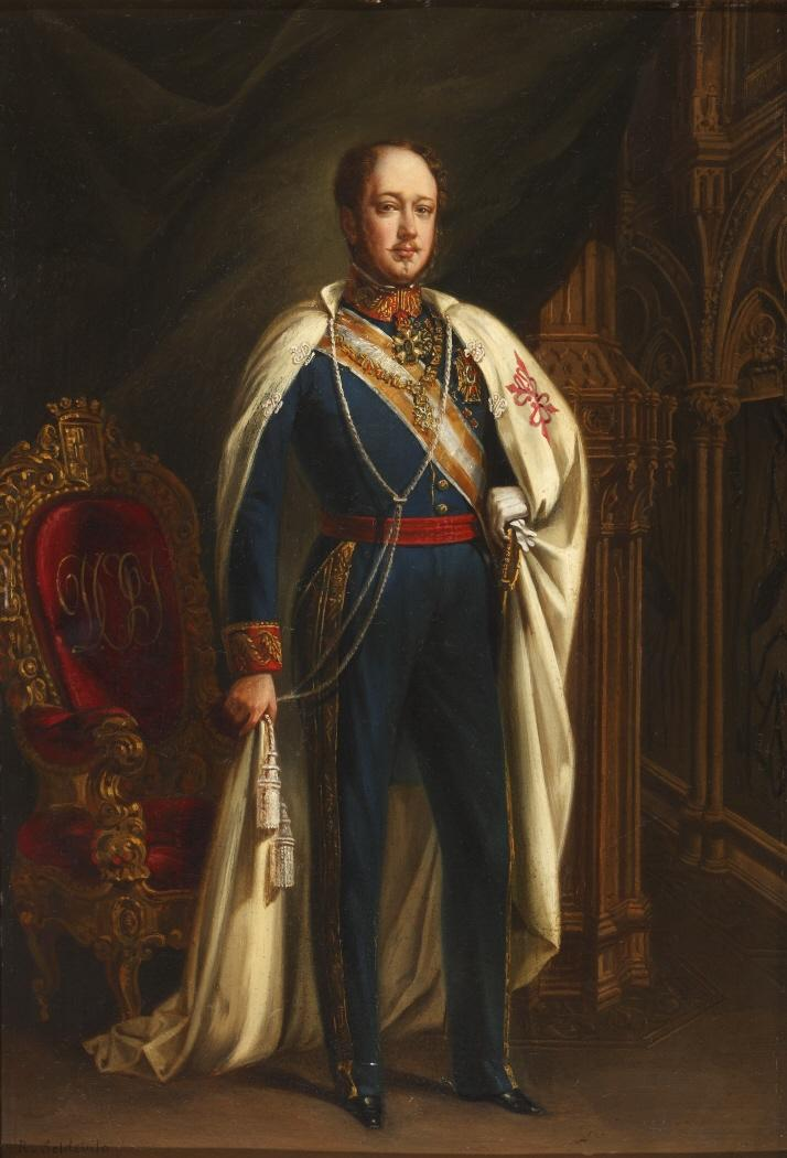 Retrato de Mariano Téllez Girón y Beaufort Spontin (1814-1882), XII duque de Osuna. Retrato de pie, ligeramente ladeado a la derecha, de Mariano Téllez Girón. Viste la capa del hábito de la Orden de Calatrava sobre uniforme militar y múltiples condecoraciones, prueba de su estatus de gentilhombre: la gran cruz y la banda de la Orden de Isabel la Católica, la cruz de comendador de la Legión de Honor francesa, la cruz de la Orden de Calatrava y el collar de la Orden de Carlos III con venera.